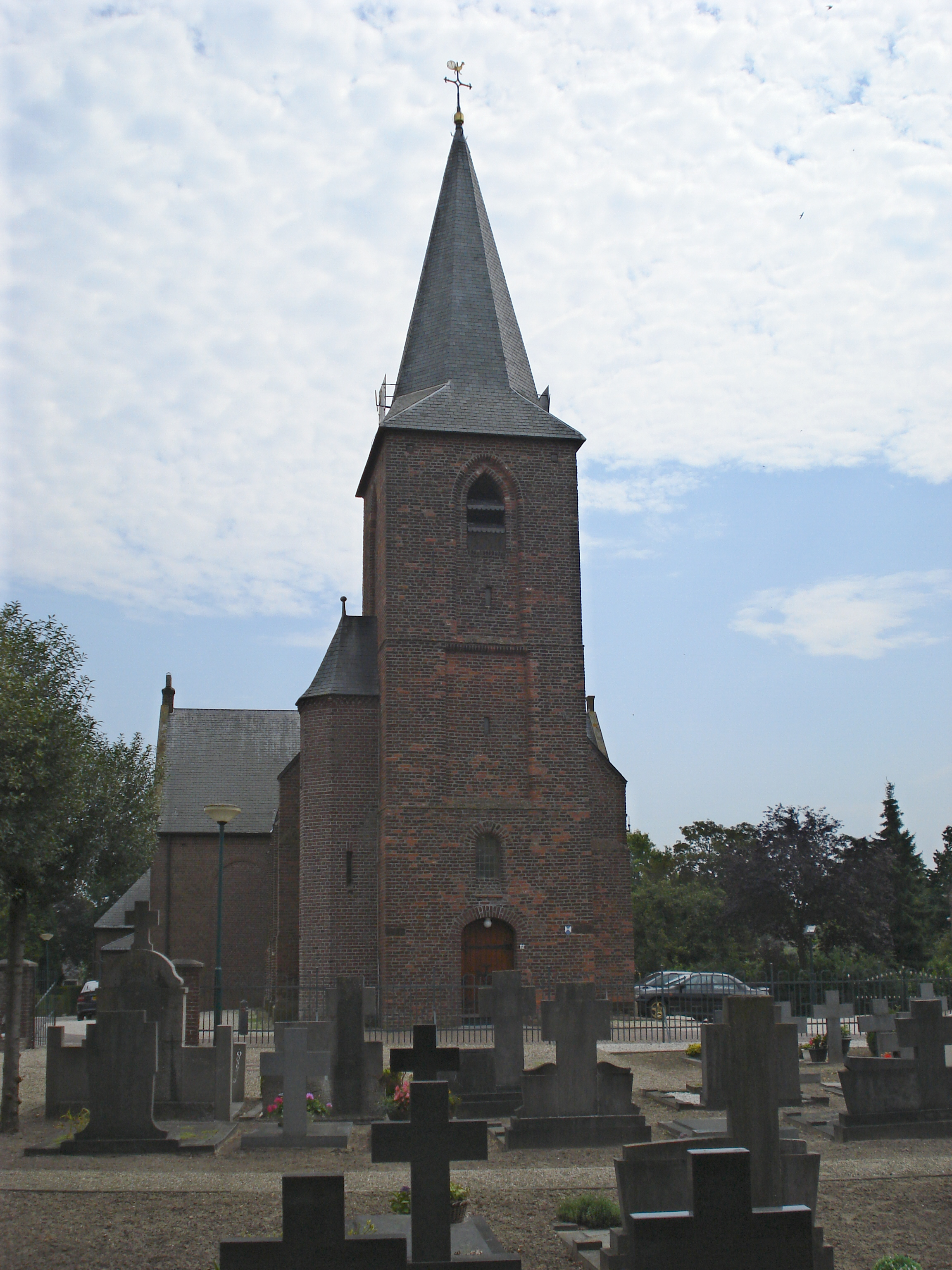 Sint Hubert, gotische kerk, 15e eeuw, torenzicht met linkeruitbouw uit 1934